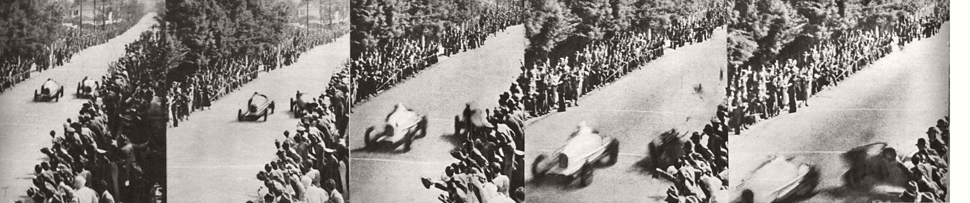 Sequência de imagens retirada de filme realizado por "O Globo" do Grande Prêmio Cidade de São Paulo, ocorrido em 12 de julho de 1936, que mostra a corredora francesa sofrendo um grave acidente que matou 6 espectadores e feriu cerca de 30, ao tentar ultrapassar o piloto brasileiro Manuel de Teffé na disputa pelo terceiro lugar; ela chegou em quarto e ficou cerca de dois meses hospitalizada.